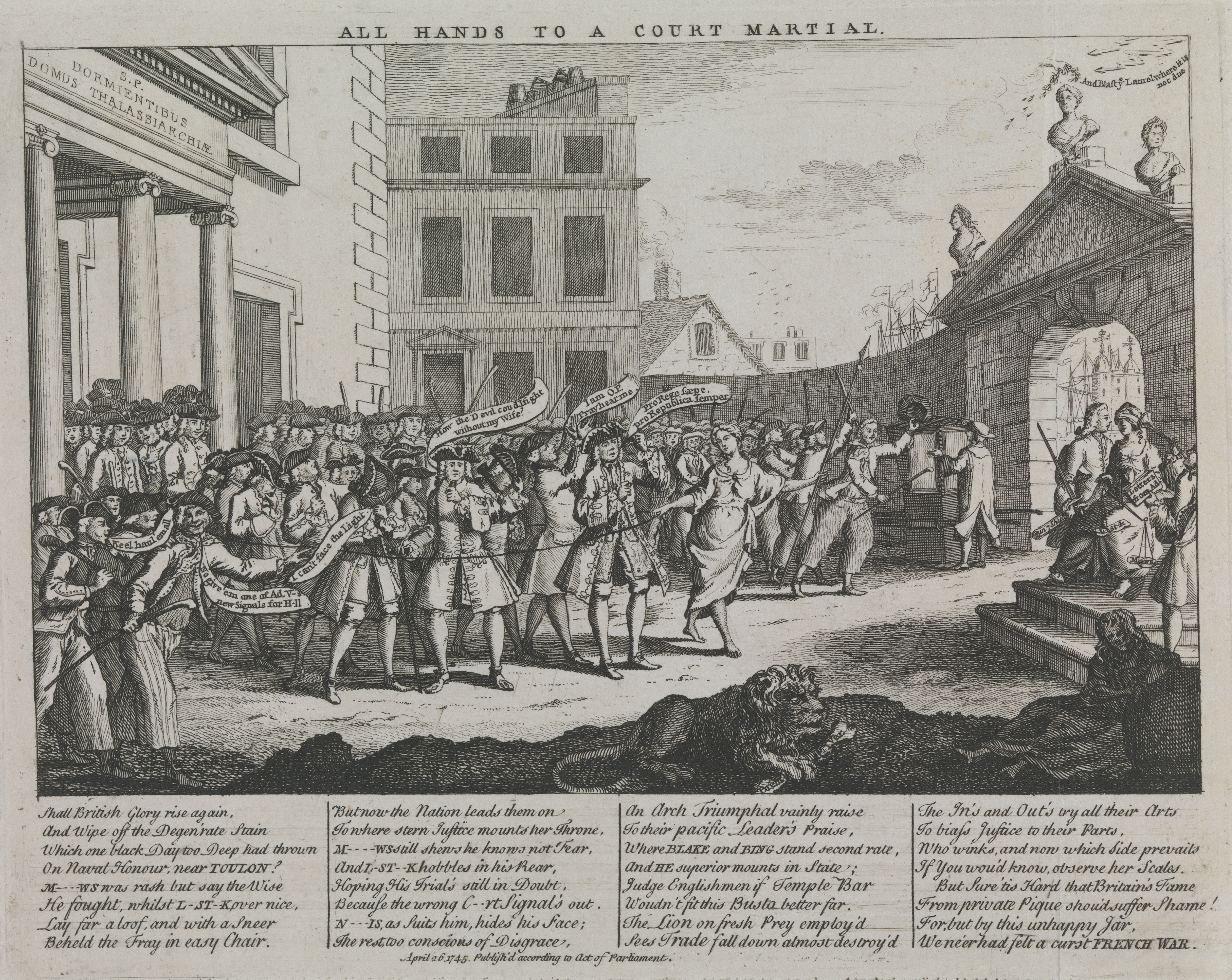 Caricature sur les officiers anglais passant en cour martiale en 1745 après la défaite de l'escadre anglaise devant Toulon en février 1744.